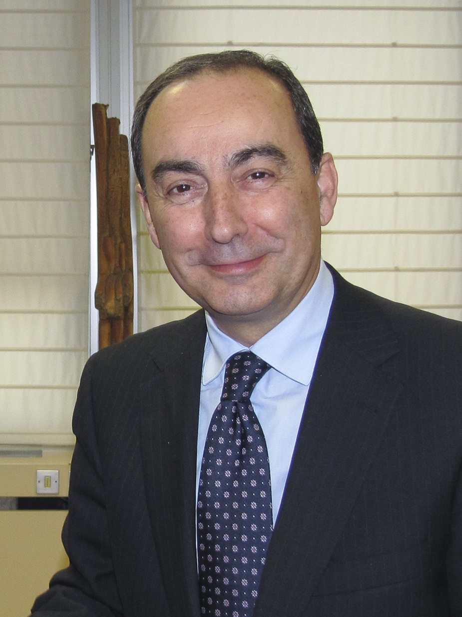 El consejero de Educación, Cultura y Deporte manifiesta que seguirá cofinanciando la Sala Robayera